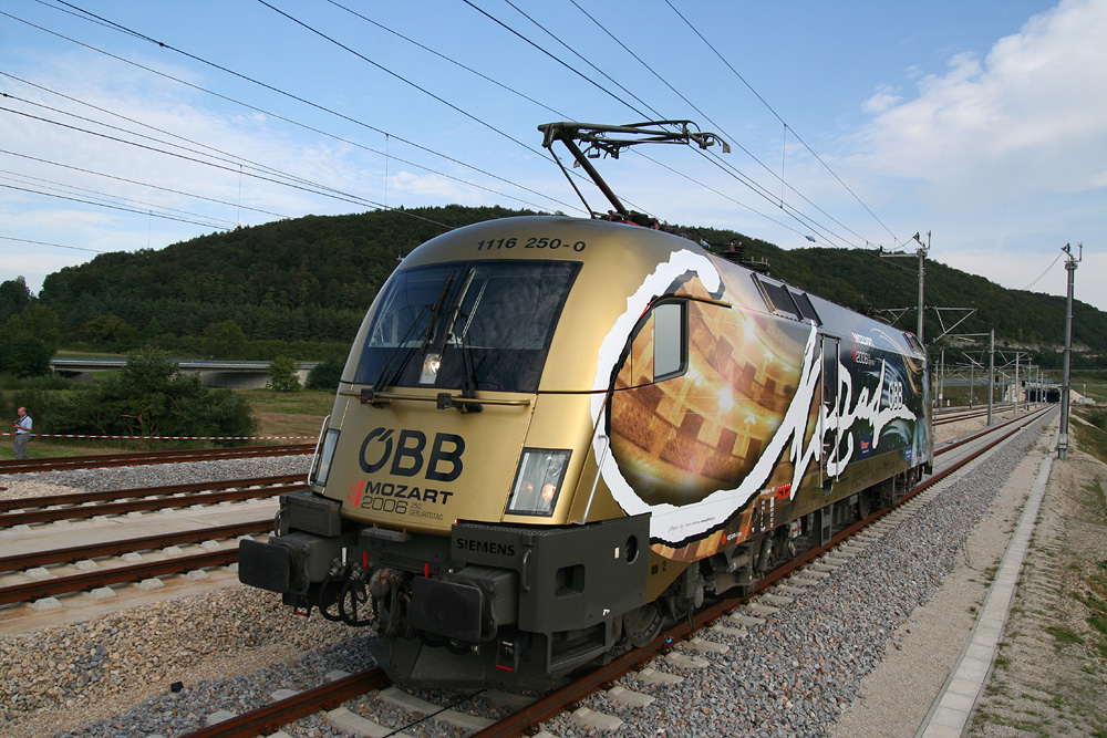 Eine Werbelok der Baureihe 1116 der ÖBB zum 250. Geburtstag von Wolfgang Amadeus Mozart. Aufnahme im Bahnhof Kinding (Altmühltal).